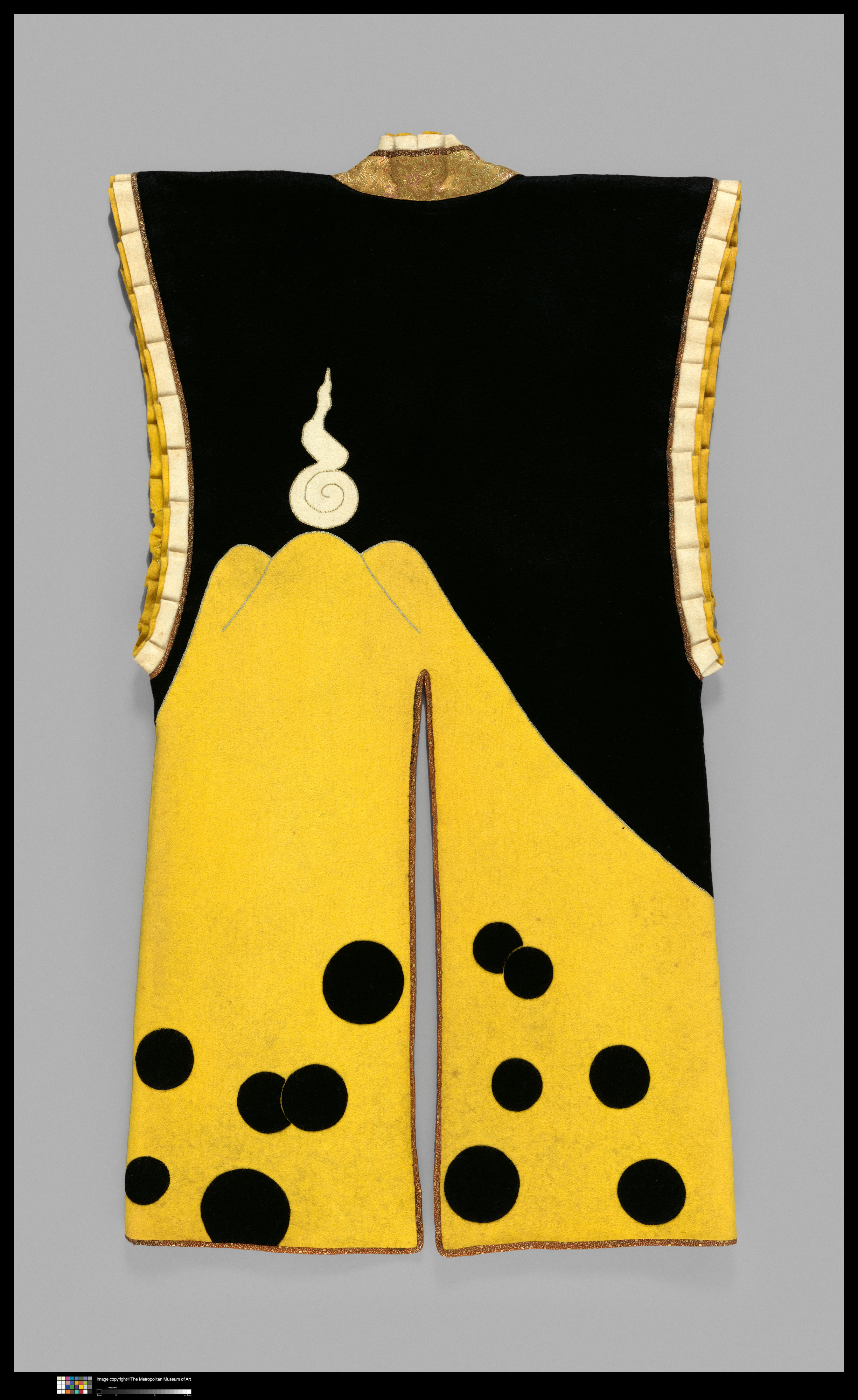 Japanese; Surcoat (Jinbaori); Surcoat